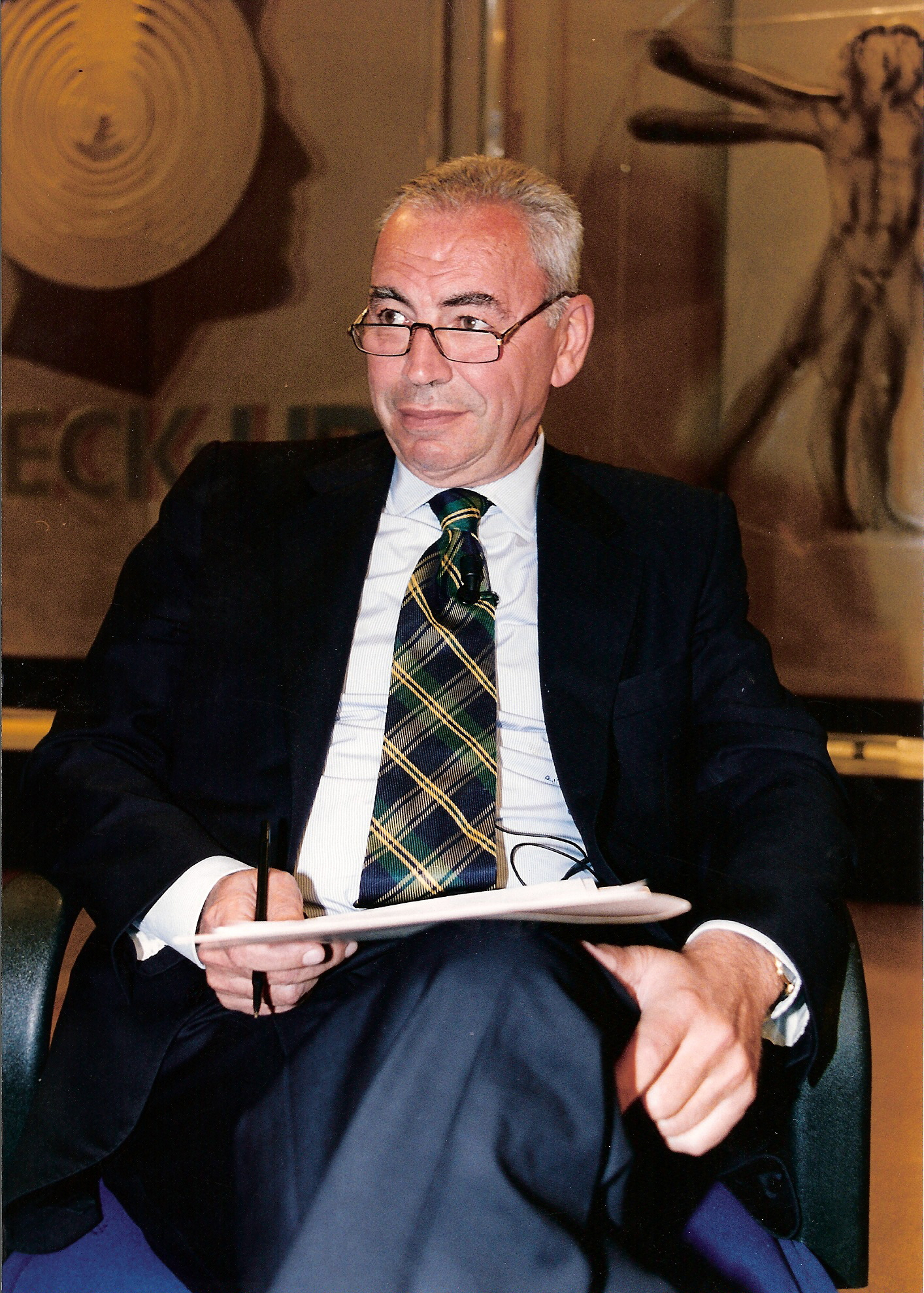 Giorgio Pardi